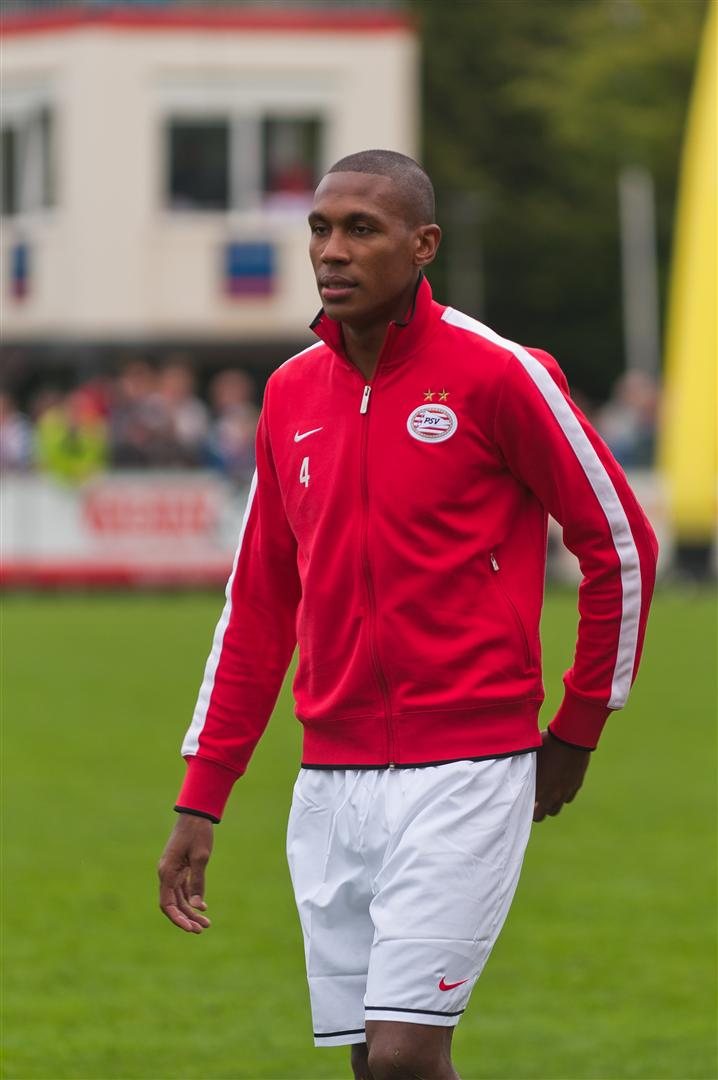 Marcelo Antônio Guedes Filho